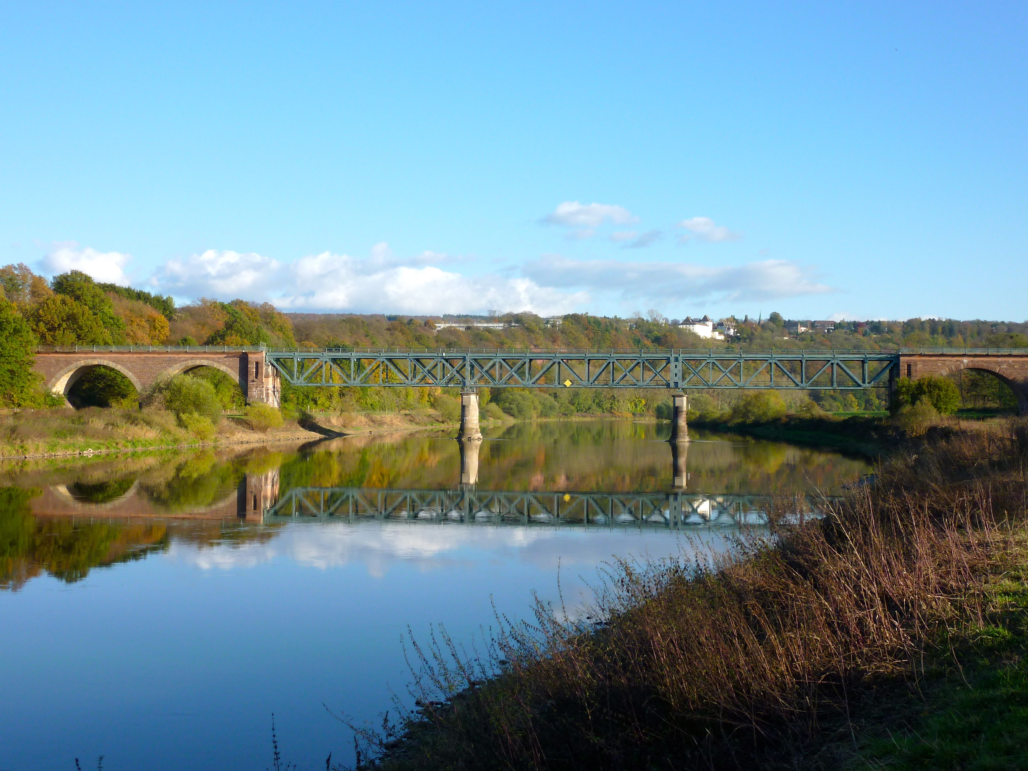 Weserüberquerung der ehemaligen Bahnstrecke Holzminden-Scherfede, bei Fürstenberg